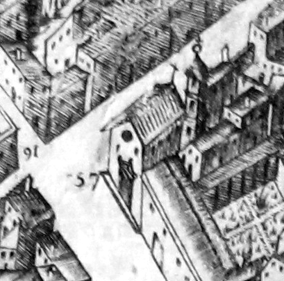 Pianta del buonsignori, dettaglio 057 san friano monastero (primo monastero di san frediano)